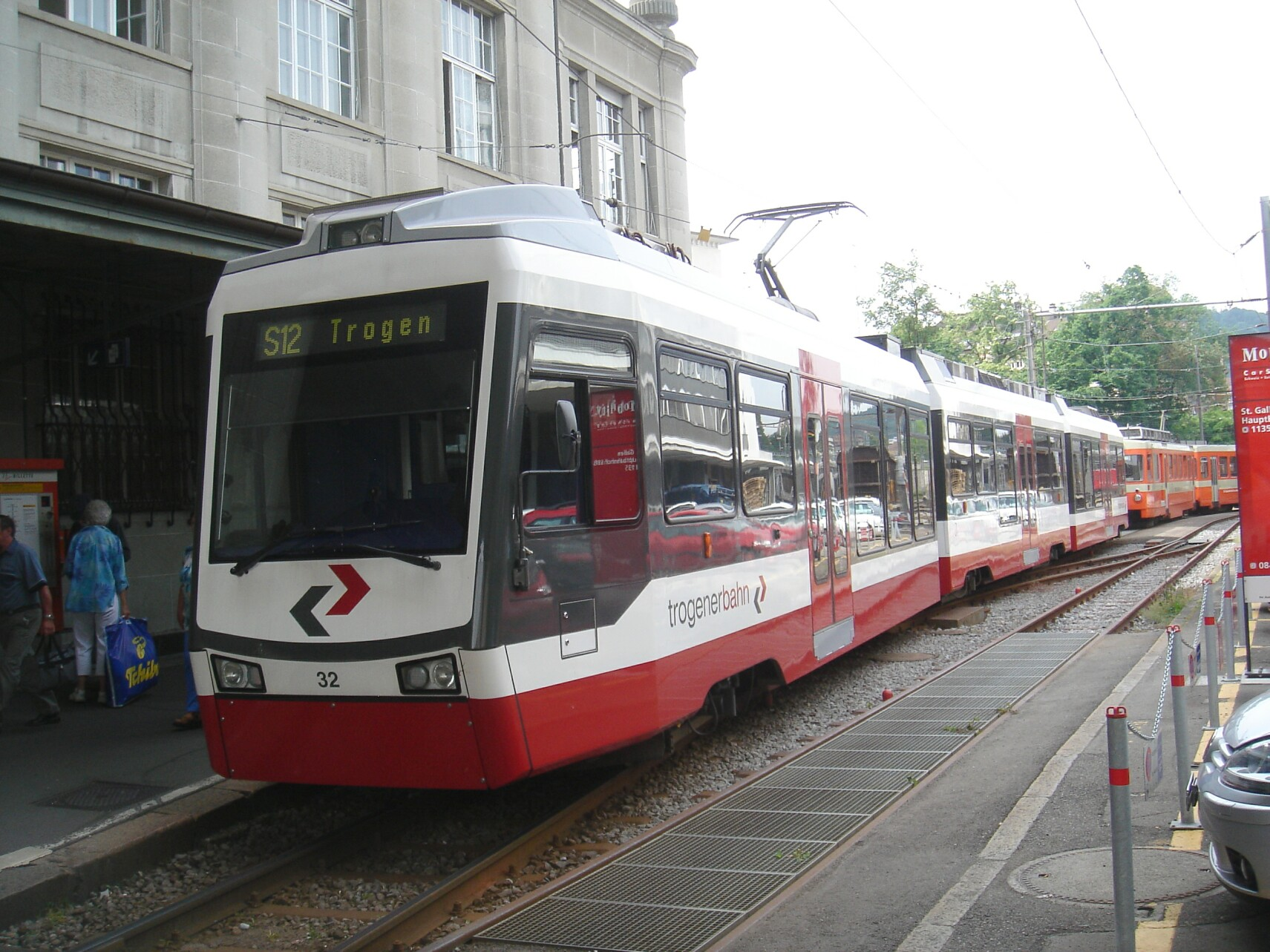 Be 4/8 32 der Appenzeller Bahnen kurz nach der Fusion noch mit Trogenerbahn-Anschriften im St. Galler Nebenbahnhof